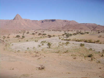 Oued Algérie. Au centre la partie plus claire est le lit de l'oued. La végétation se rassemble sur les rives, voire dans le lit de l'oued.